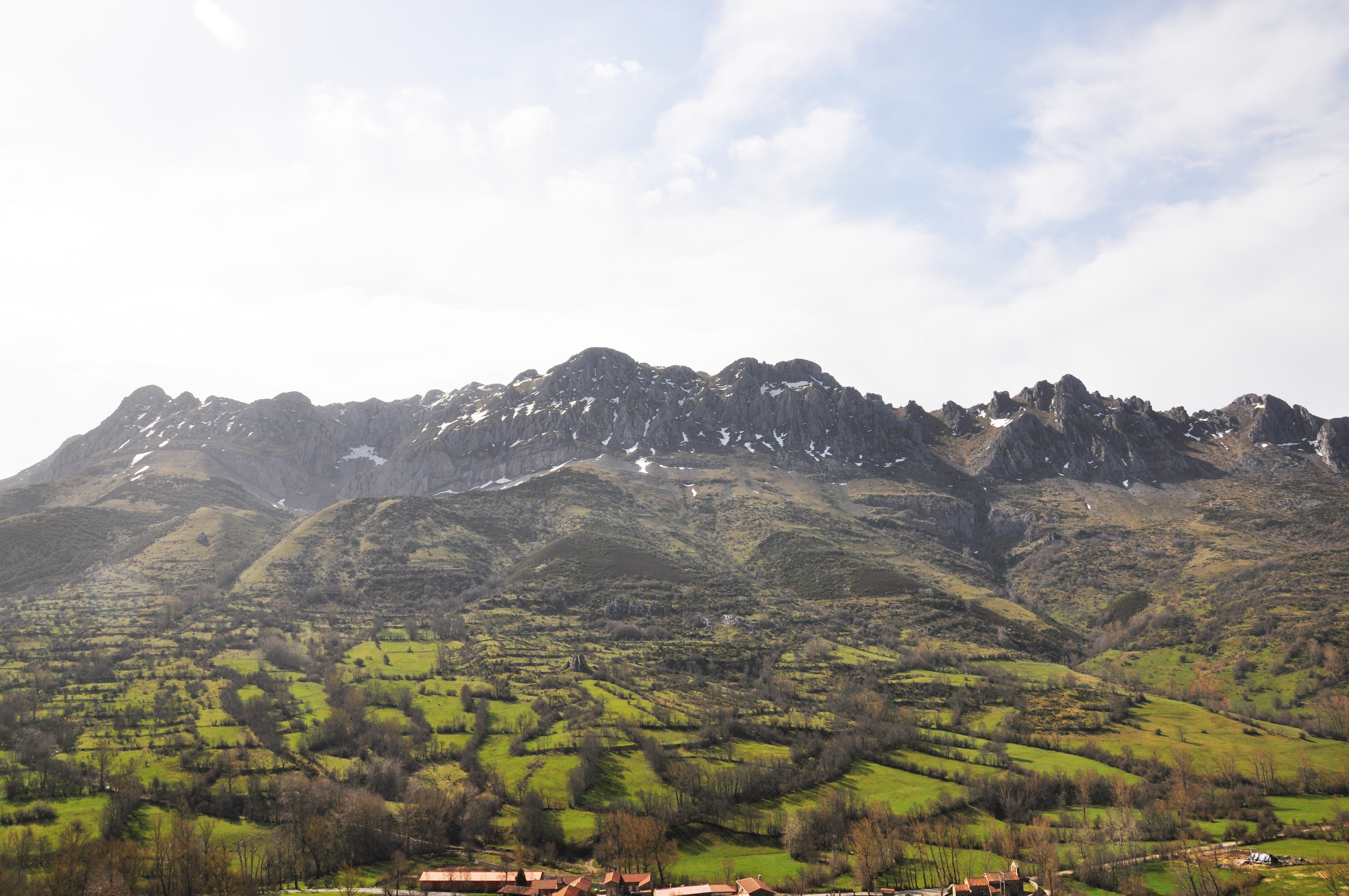 Zona del valle en la que se dividen los Pueblos de Genicera y Lavandera